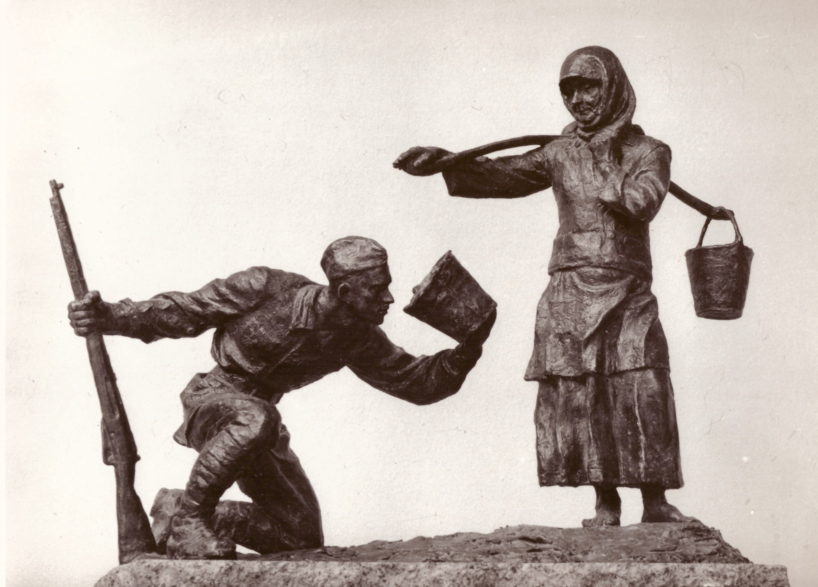 Жарке літо 1941-го. 1985. Яготинський історичний музей, Київська область. Скульптор Таранченко В.О. Скульптура. Оргскло тоноване. 59 х 80 х 35.